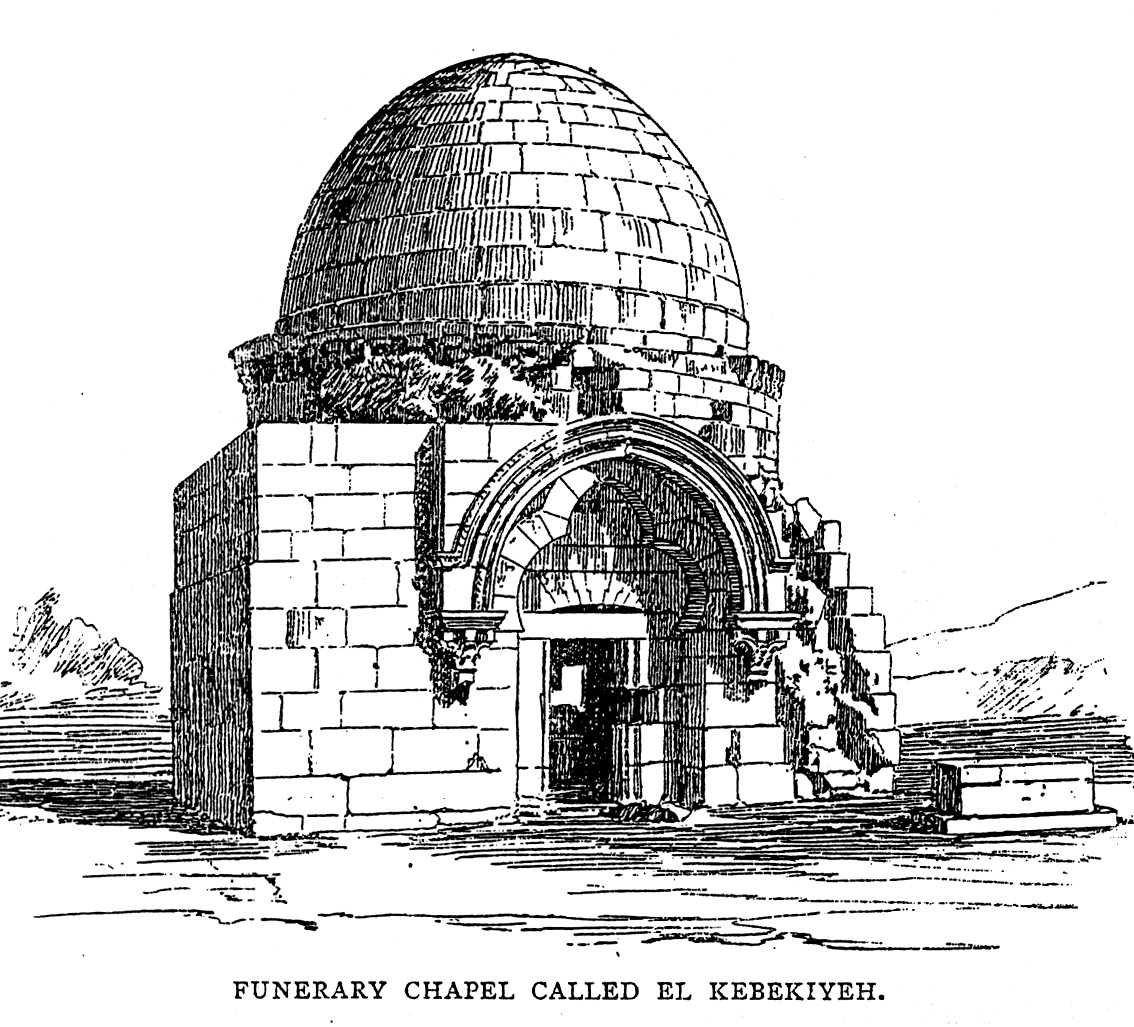 תרשים של הכובכייה